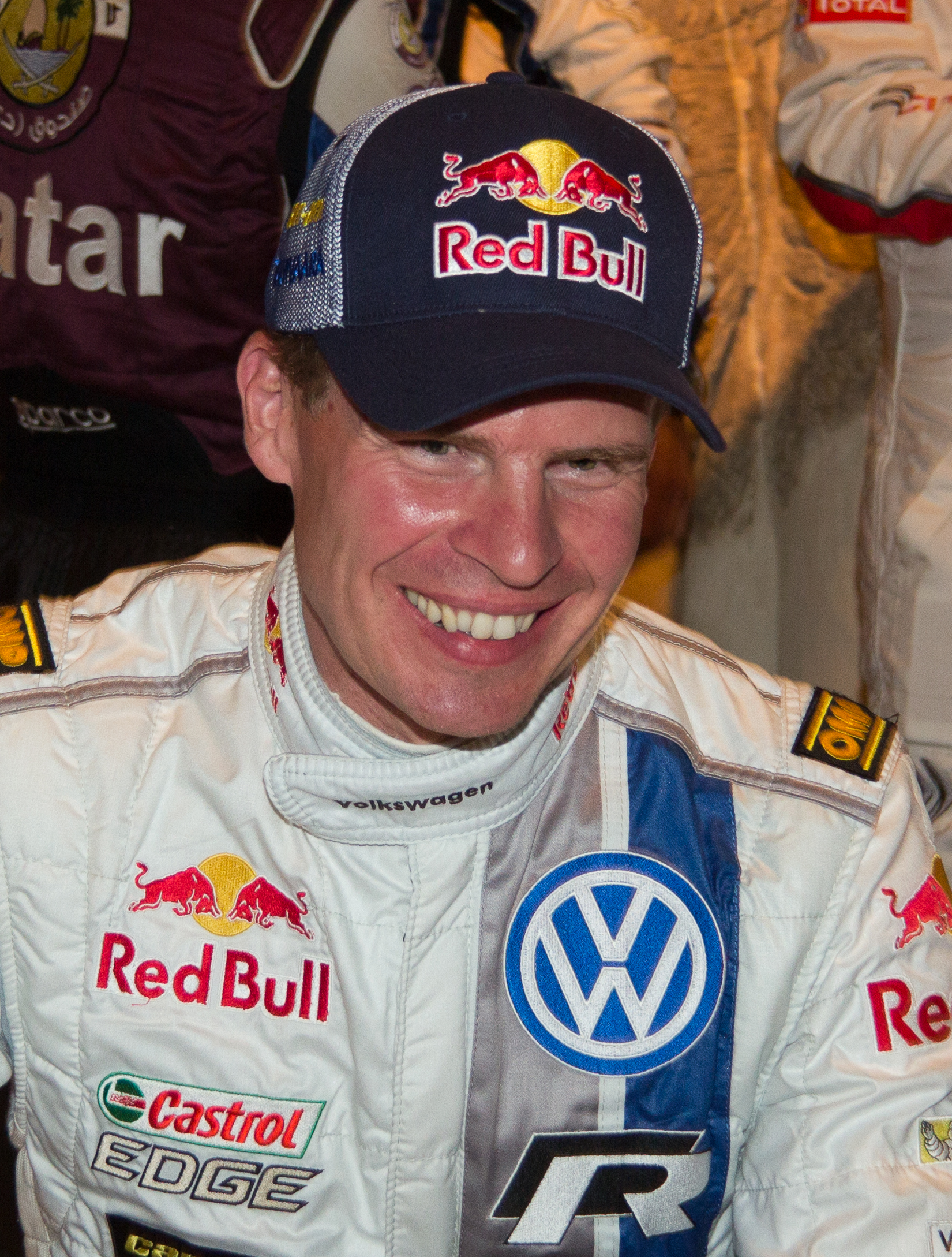 ADAC Rallye Deutschland 2013 - Empfang der Stadt Köln - Miikka Anttila